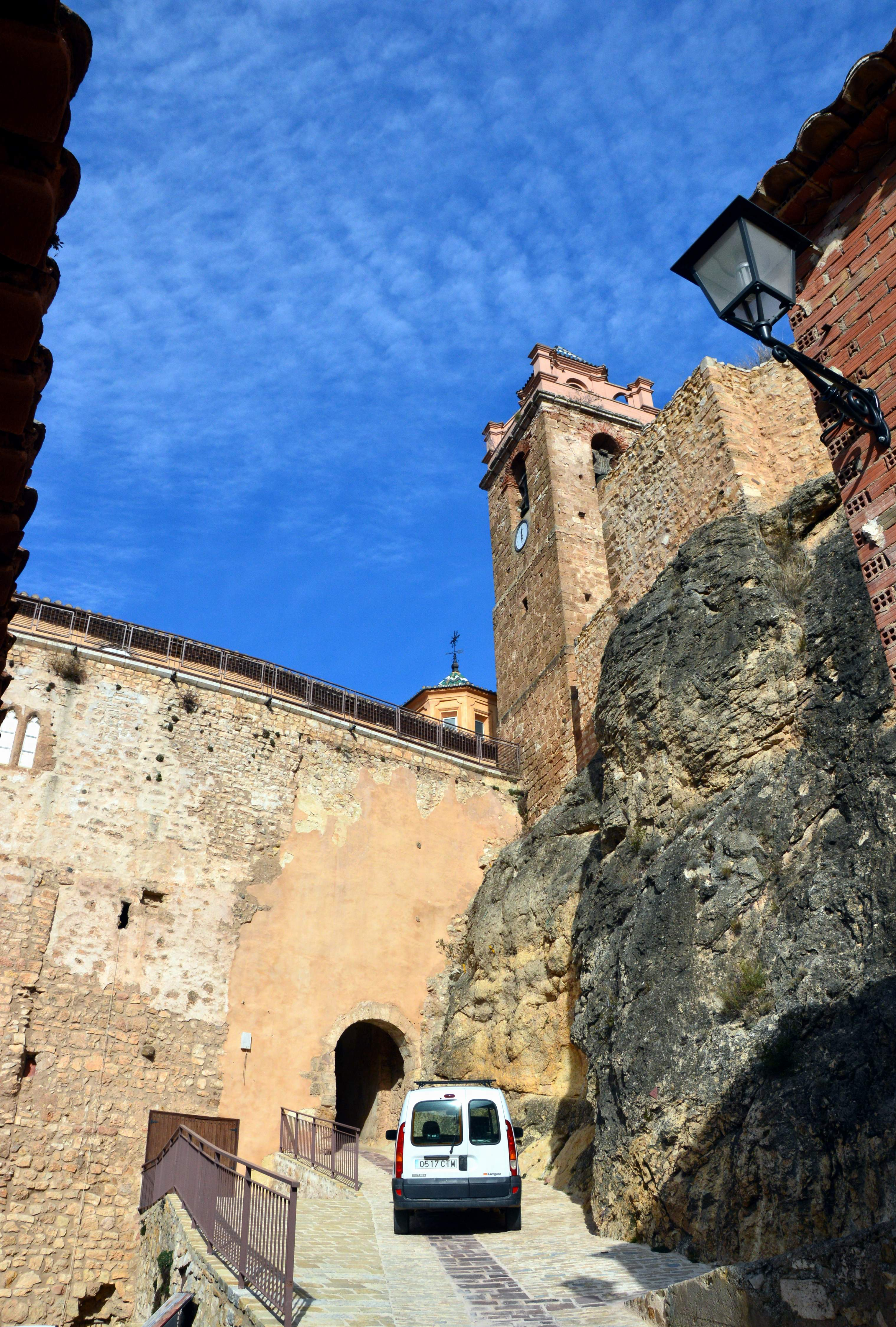 Iglesia-fortaleza de Castielfabib (Valencia), con detalle del campanario donde se hace el volteo humano (2019).